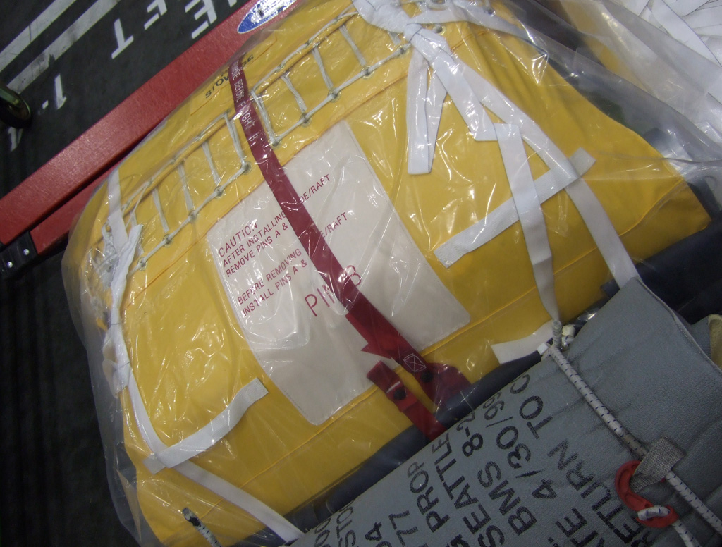 Notrutsche in verpacktem Zustand A packed evacuation slide